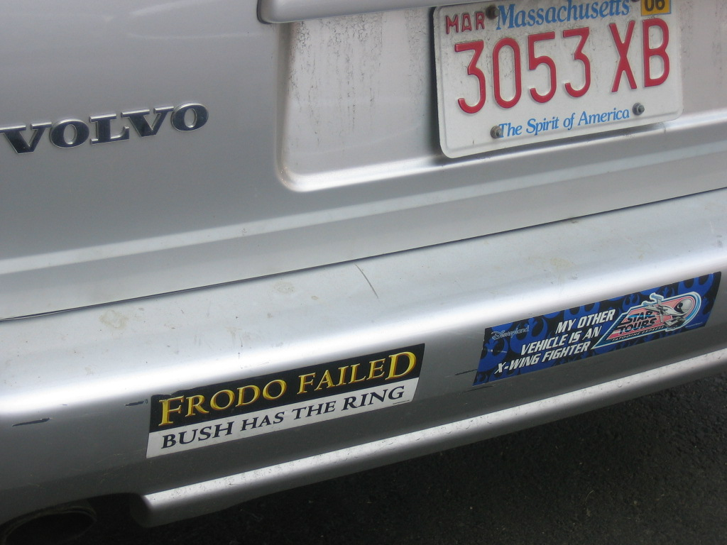 Bumper stickers